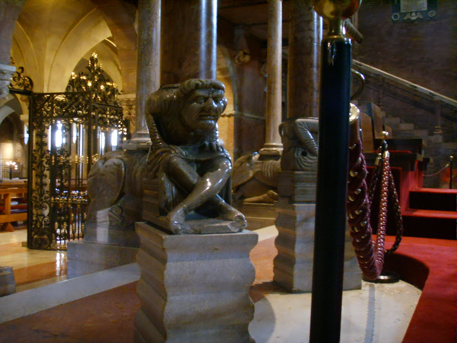 duomo di modena